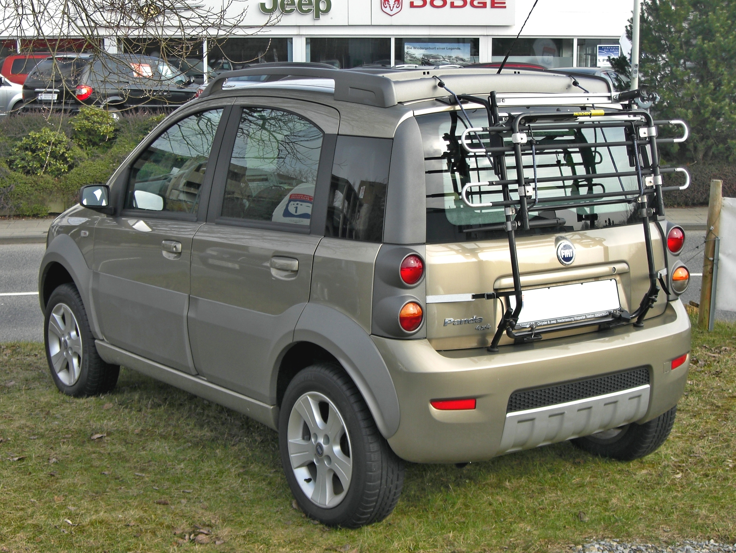 Fiat Panda 4x4